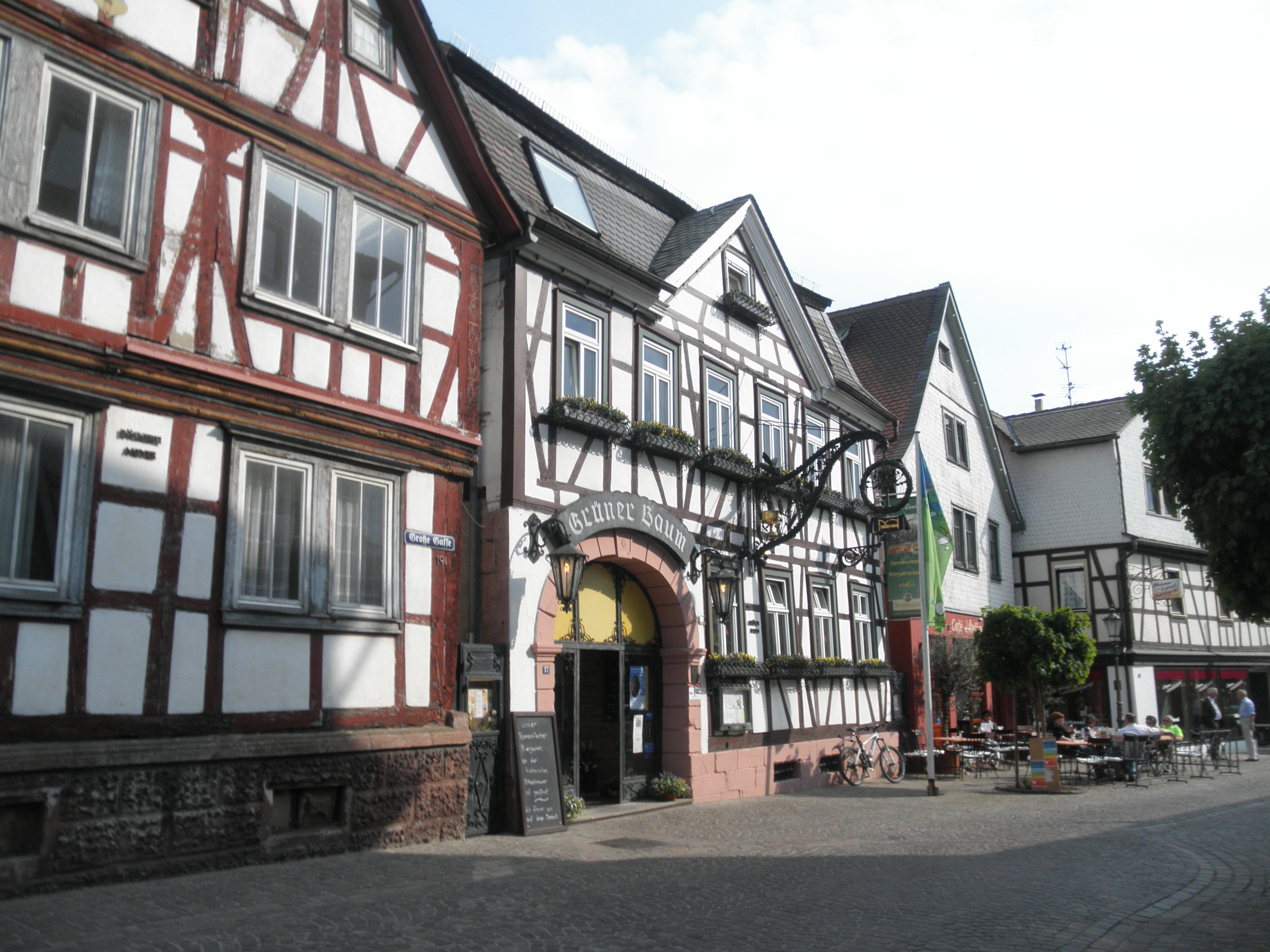 historia gastejo "Grüner Baum" en Michelstadt